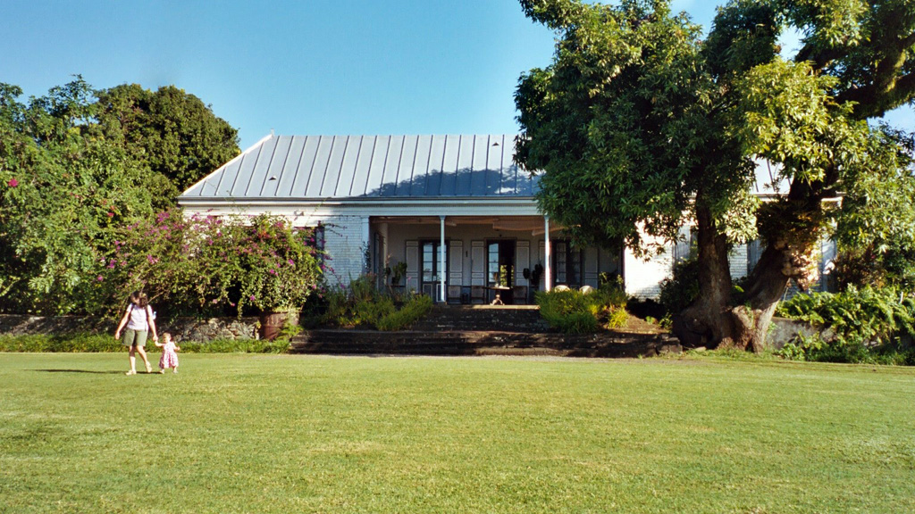 Domaine du Grand Hazier - Entrée